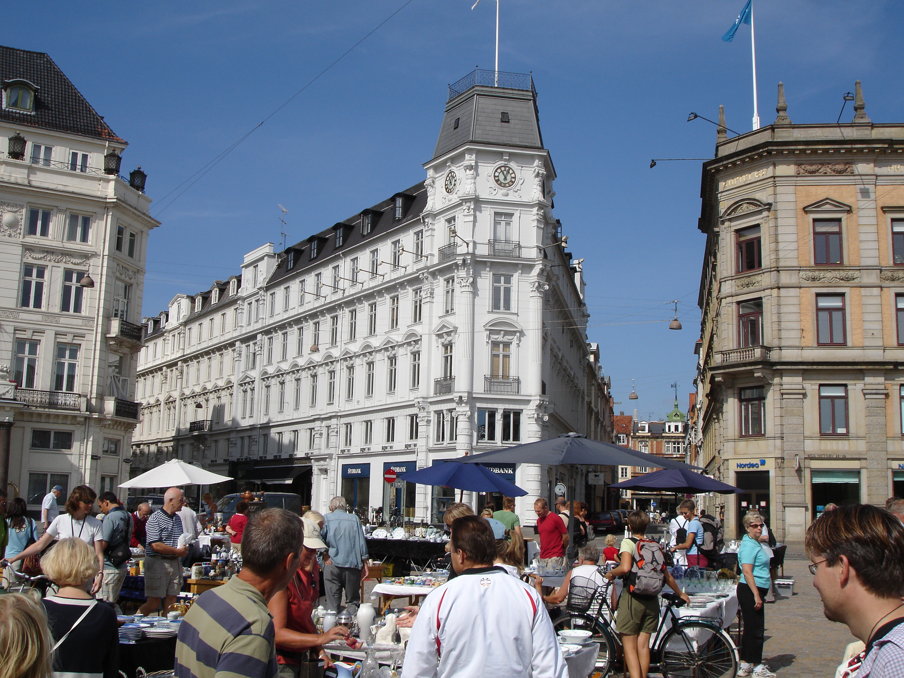 Kongens Nytorv 30 in Copenhagen, Denmark, flanked by Hovedvagtsgade to the left and Ny Adelgade to the right.